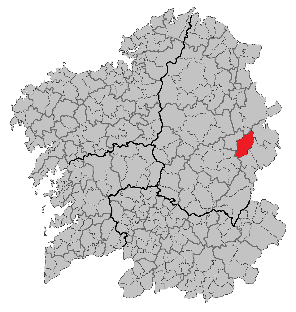 Mapa coa localización do concello de Becerreá.